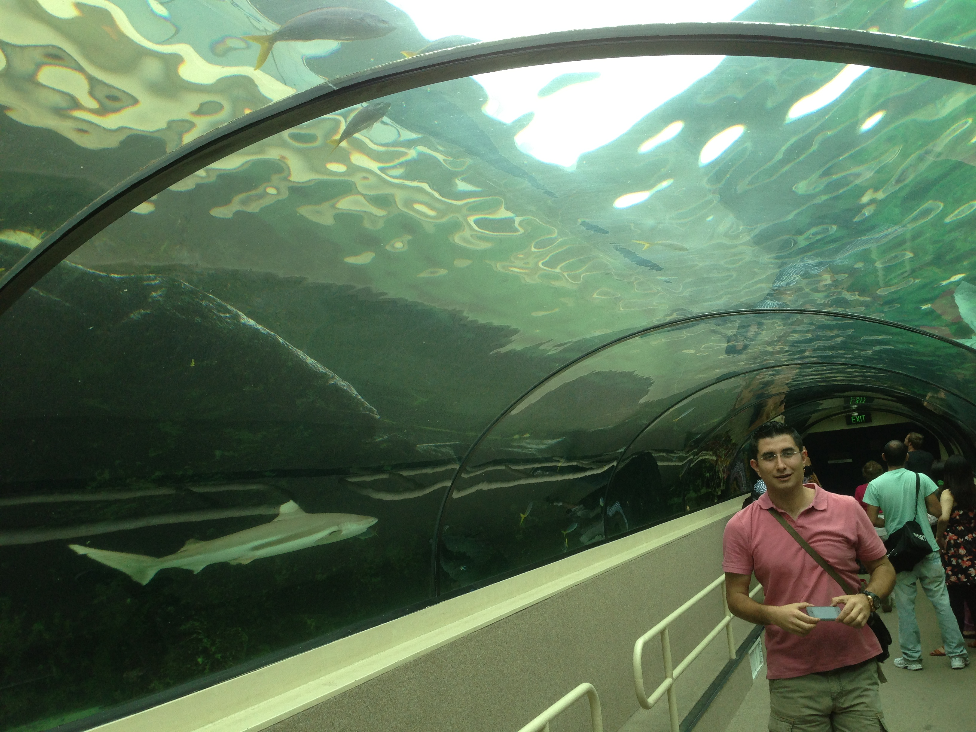 Darling Harbour SYDNEY